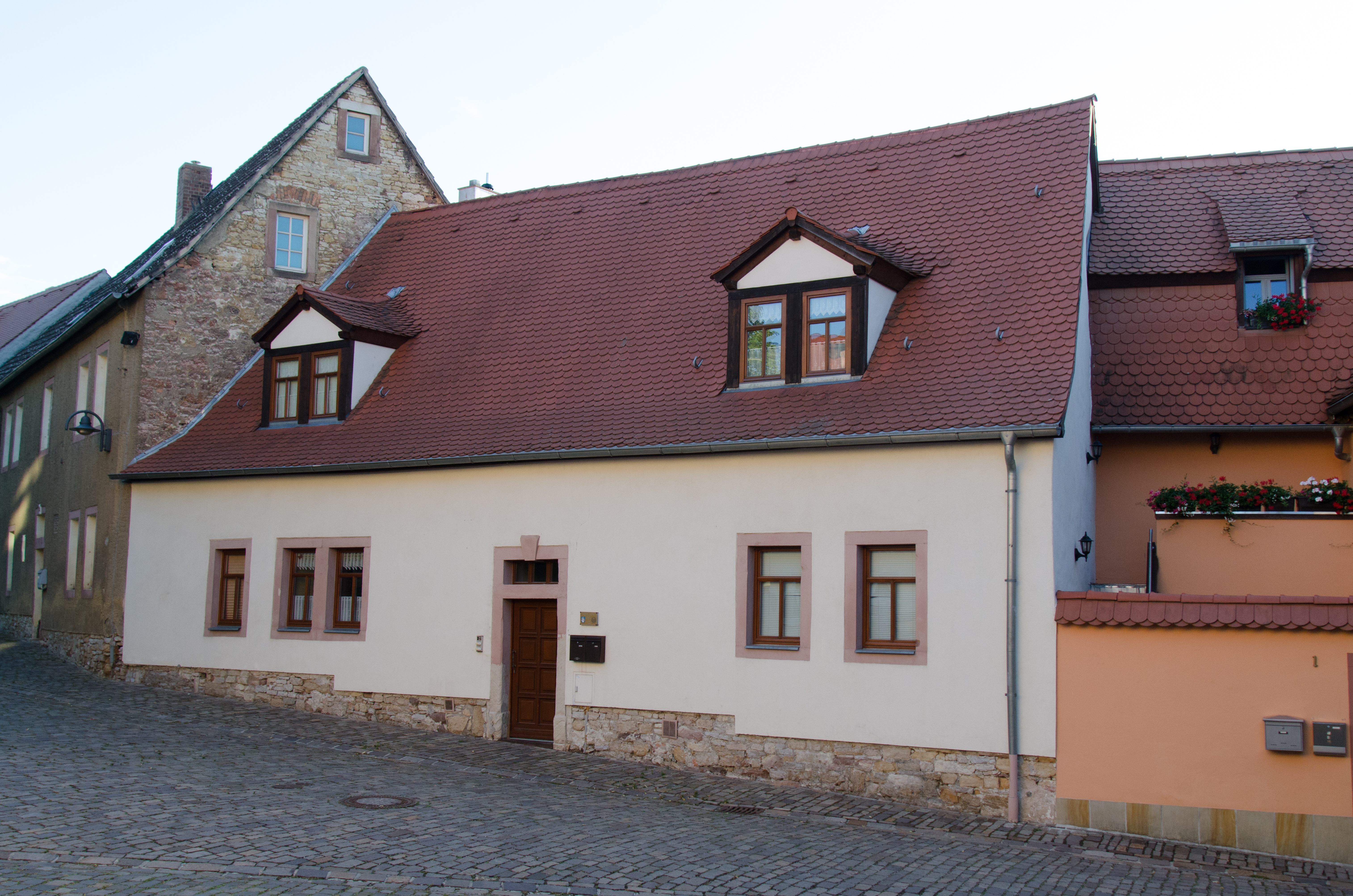 Querfurt, Kirchplan 8